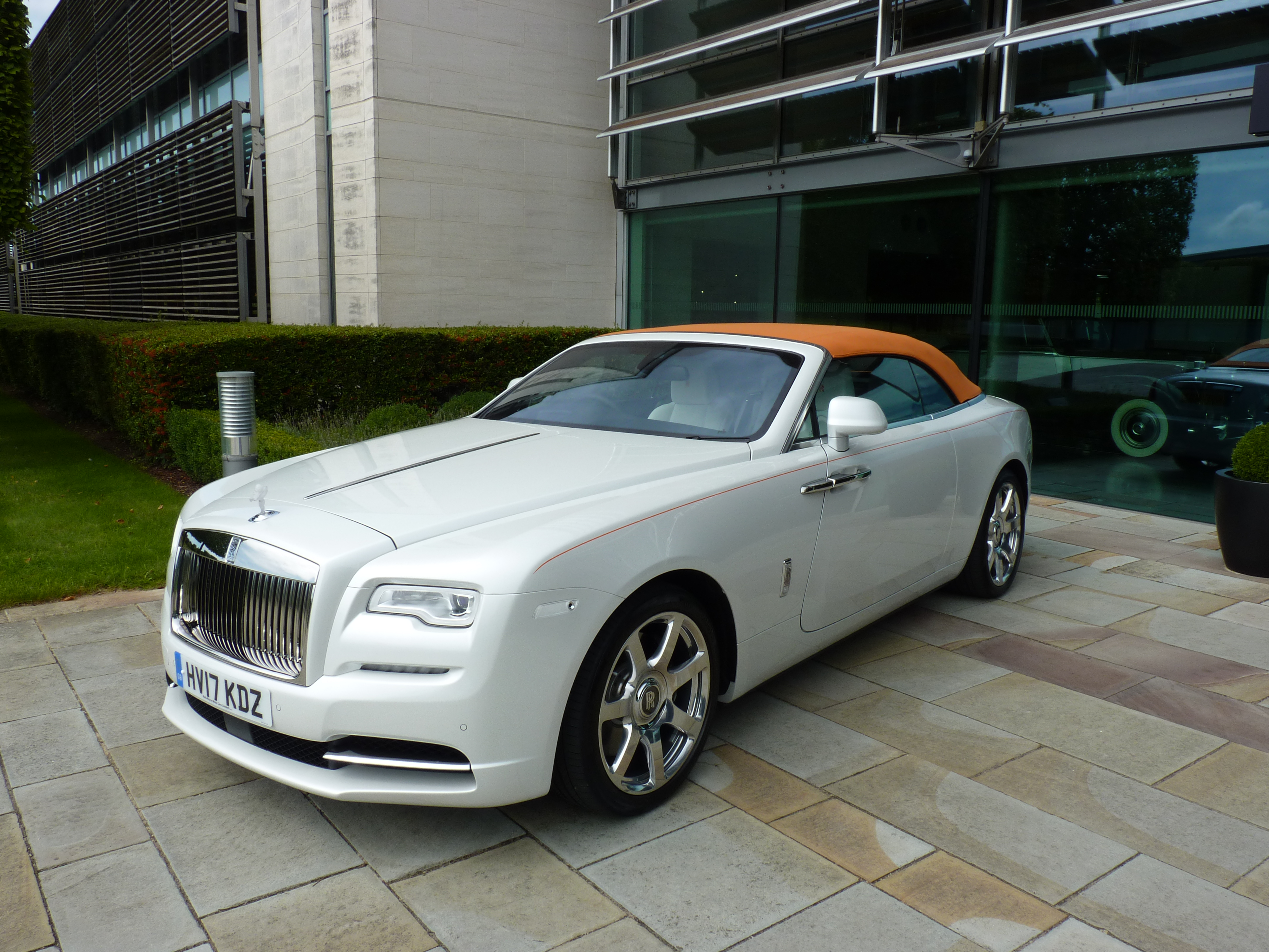 Rolls-Royce Dawn à Goodwood (2017)